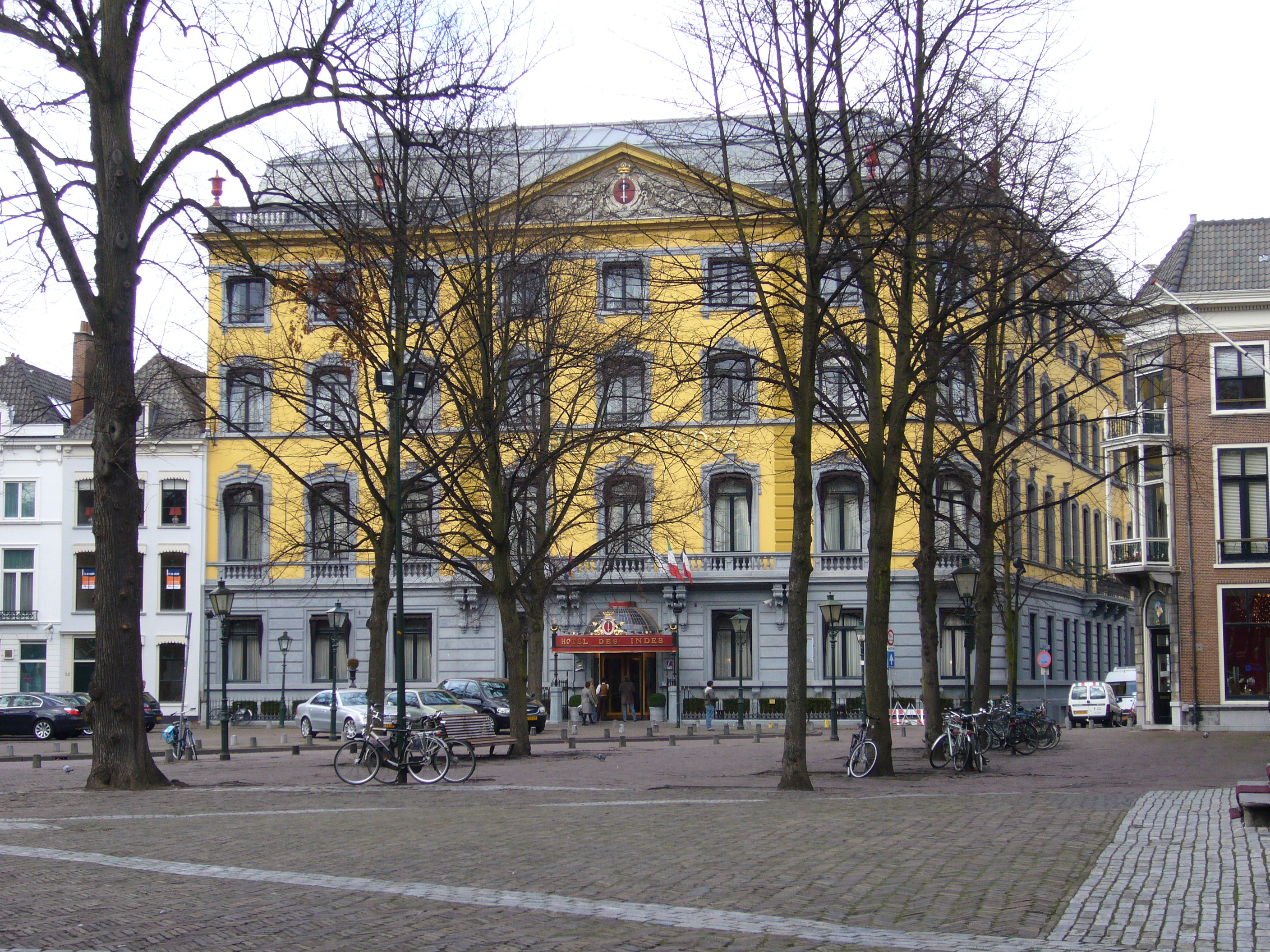 Hotel Des Indes, Lange Voorhout, Den Haag